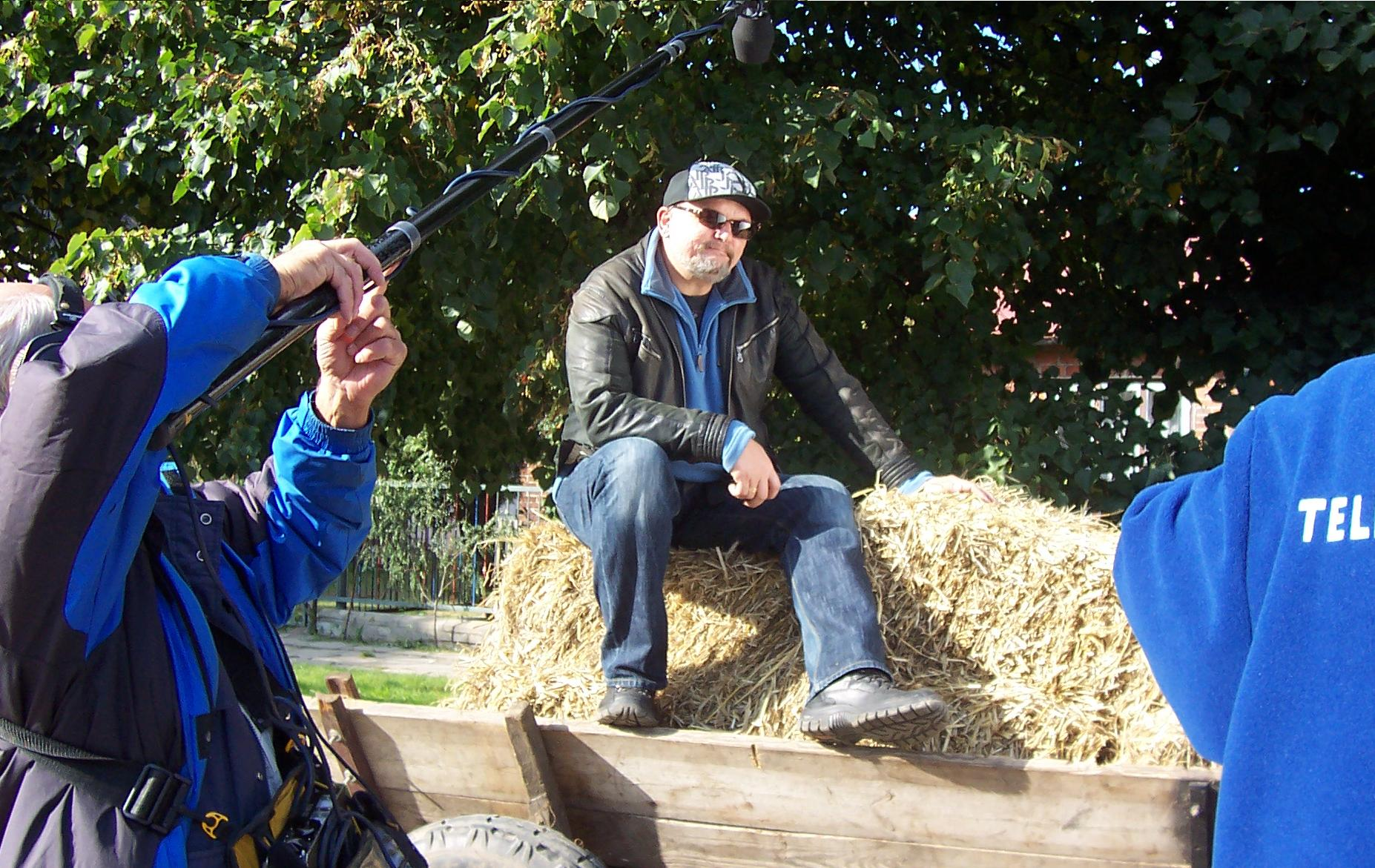 Wywiad z Wojciechem Adamczykiem na planie serialu Ranczo